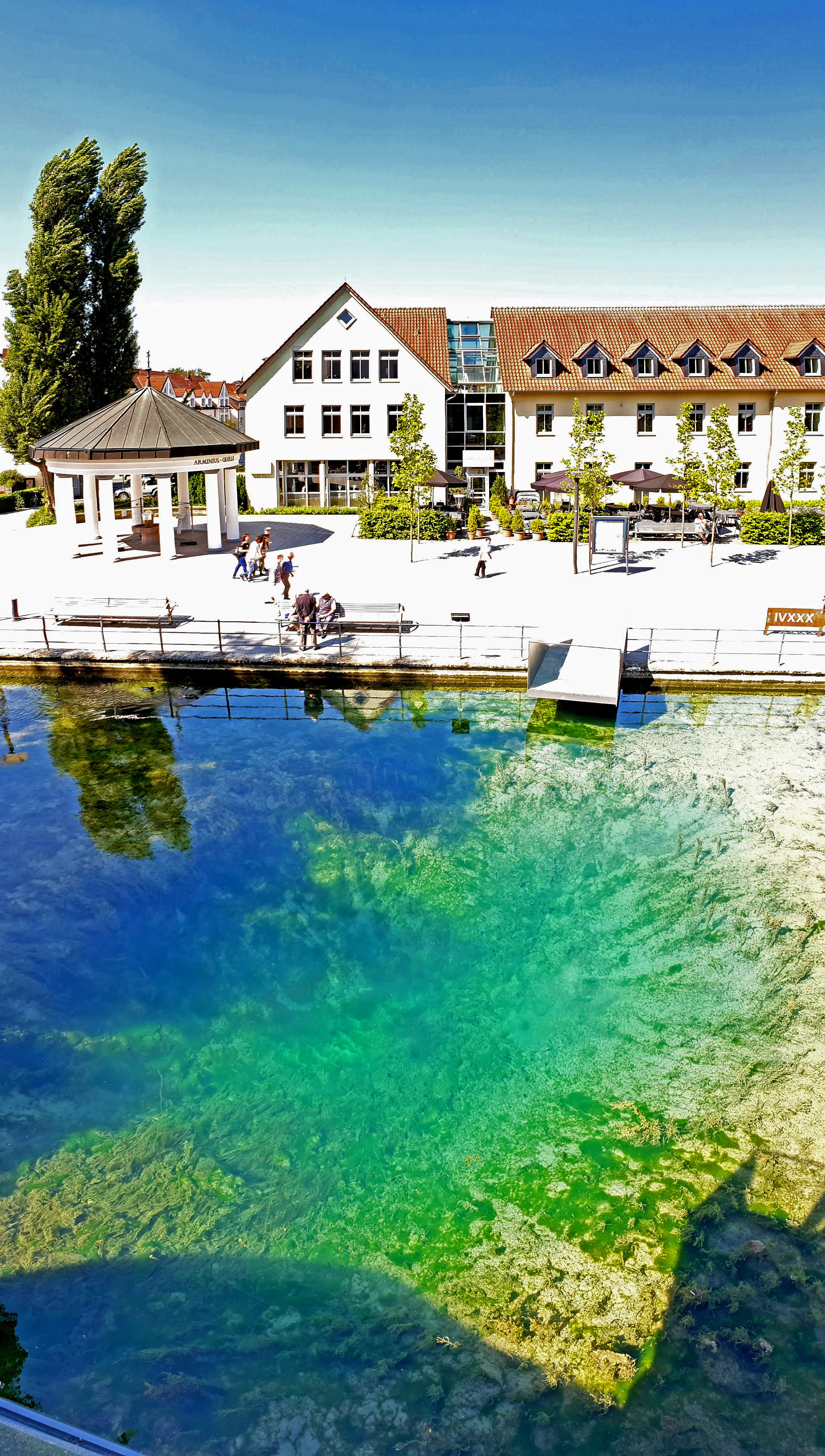 Am 21.05.2018 war die Lippequelle sehr sauber und wenig bewuchert und gab einen tollen Blick auf Odins Auge preis.